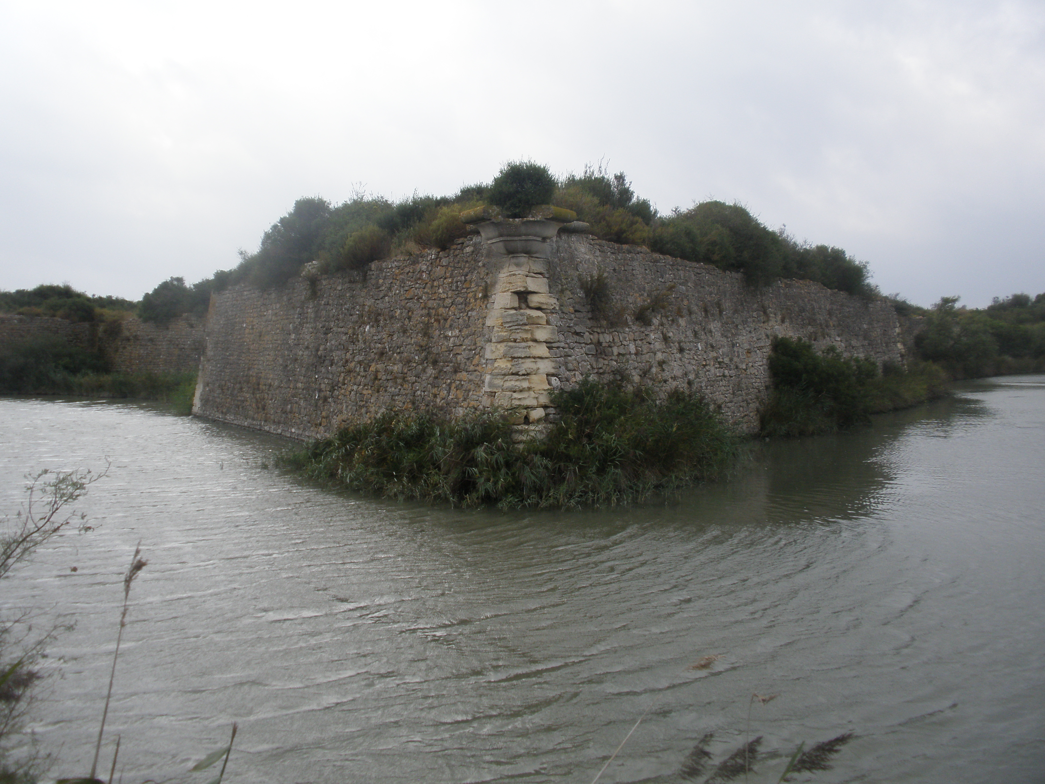 Fort de Peccais, (Inscrit, 1978)